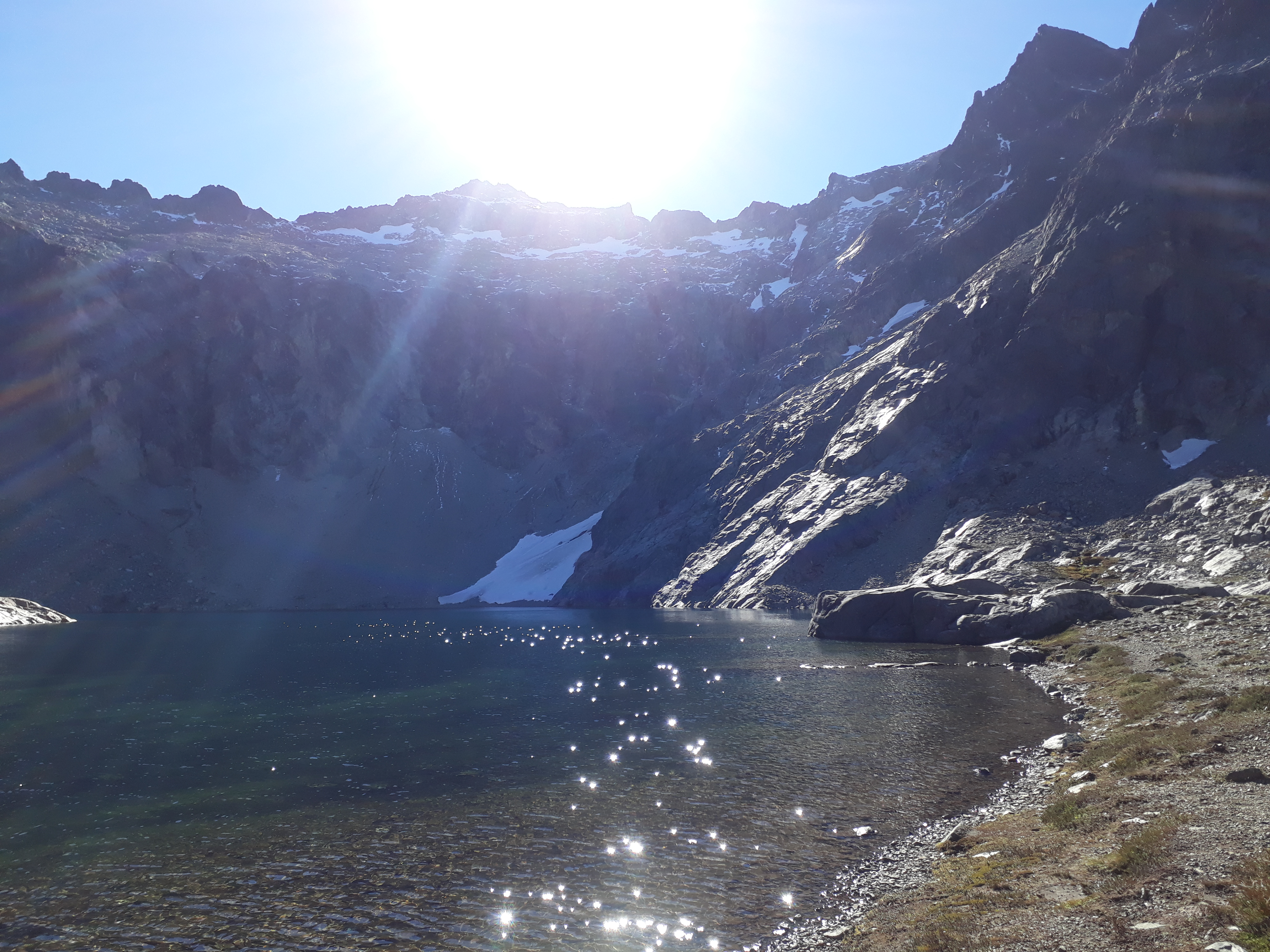 La Laguna Témpanos se encuentra a 1600 metros sobre el nivel del mar y se accede a ella luego de media hora de caminata por un pedrero partiendo desde el Refugio Jakob. Debe su nombre a los bloques de hielo que flotan en ella en las estaciones más frías.